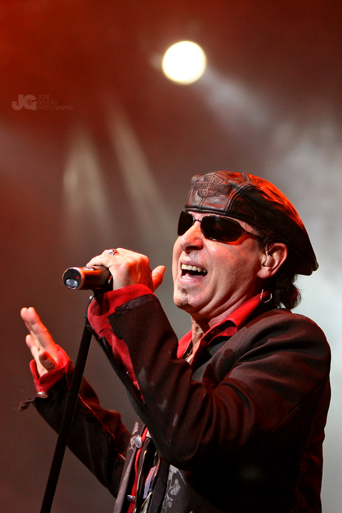 Scorpions @ Pavilhão Atlântico 04 Nov 2007